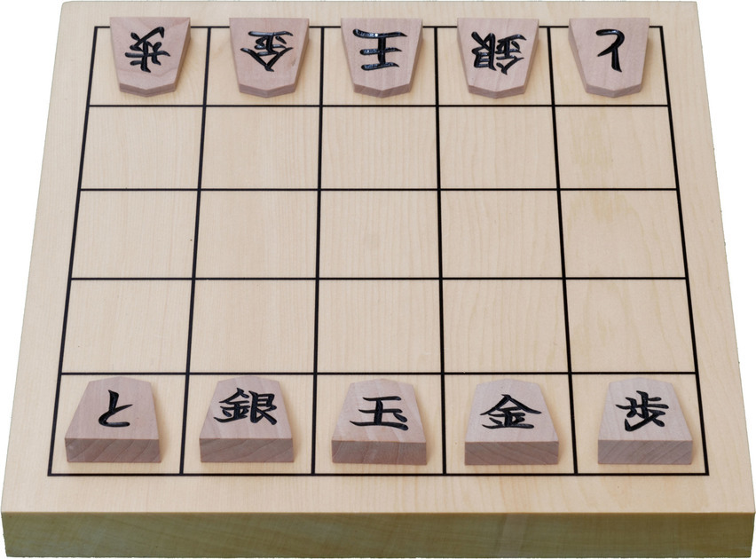 Position initiale d'un jeu de Kyoto Shogi (variante du Shogi).